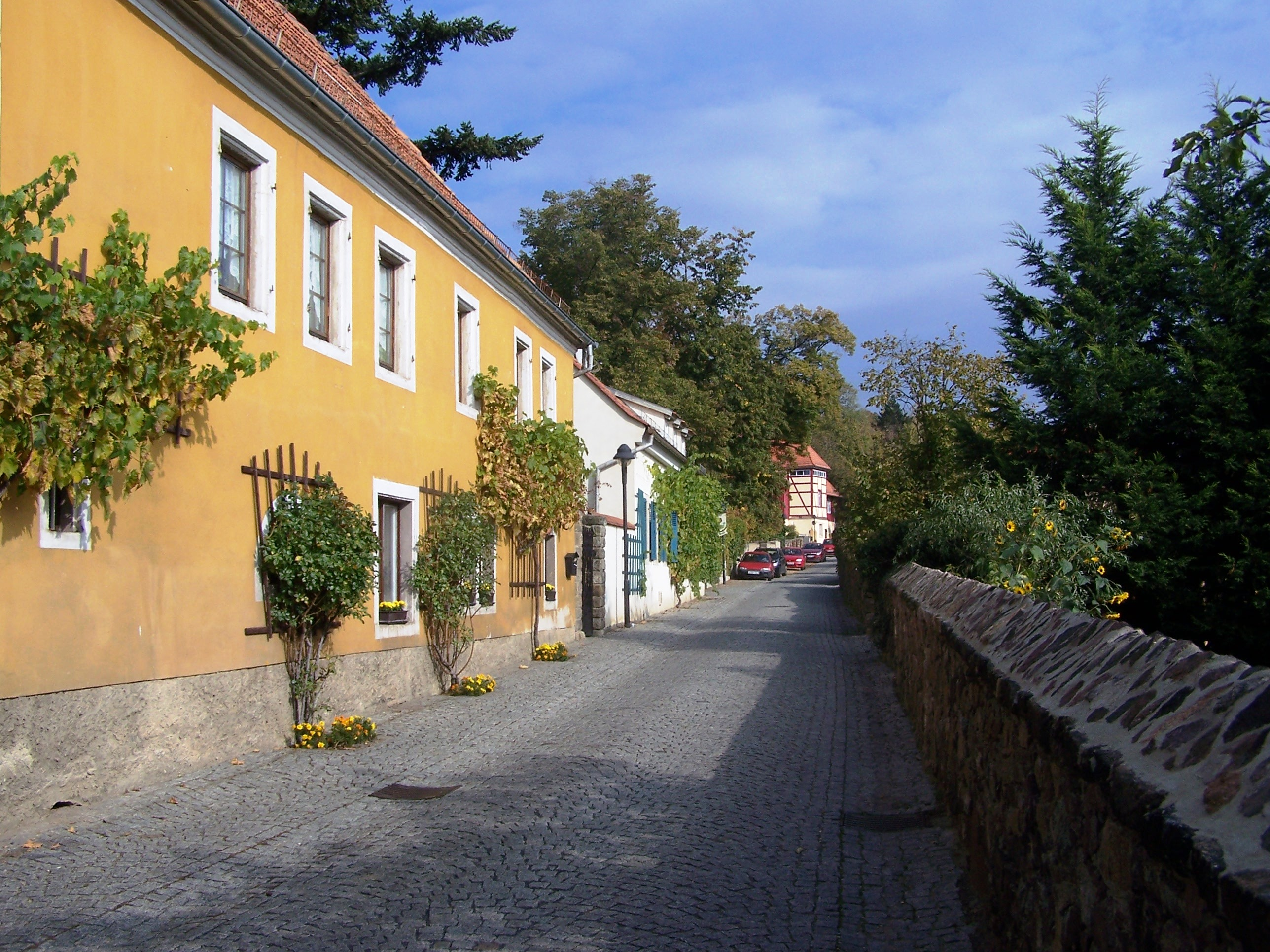 Radebeul, Weinbergstraße 14 und 16, Winzerhaus Barth (im Hintergrund das Retzschgut)